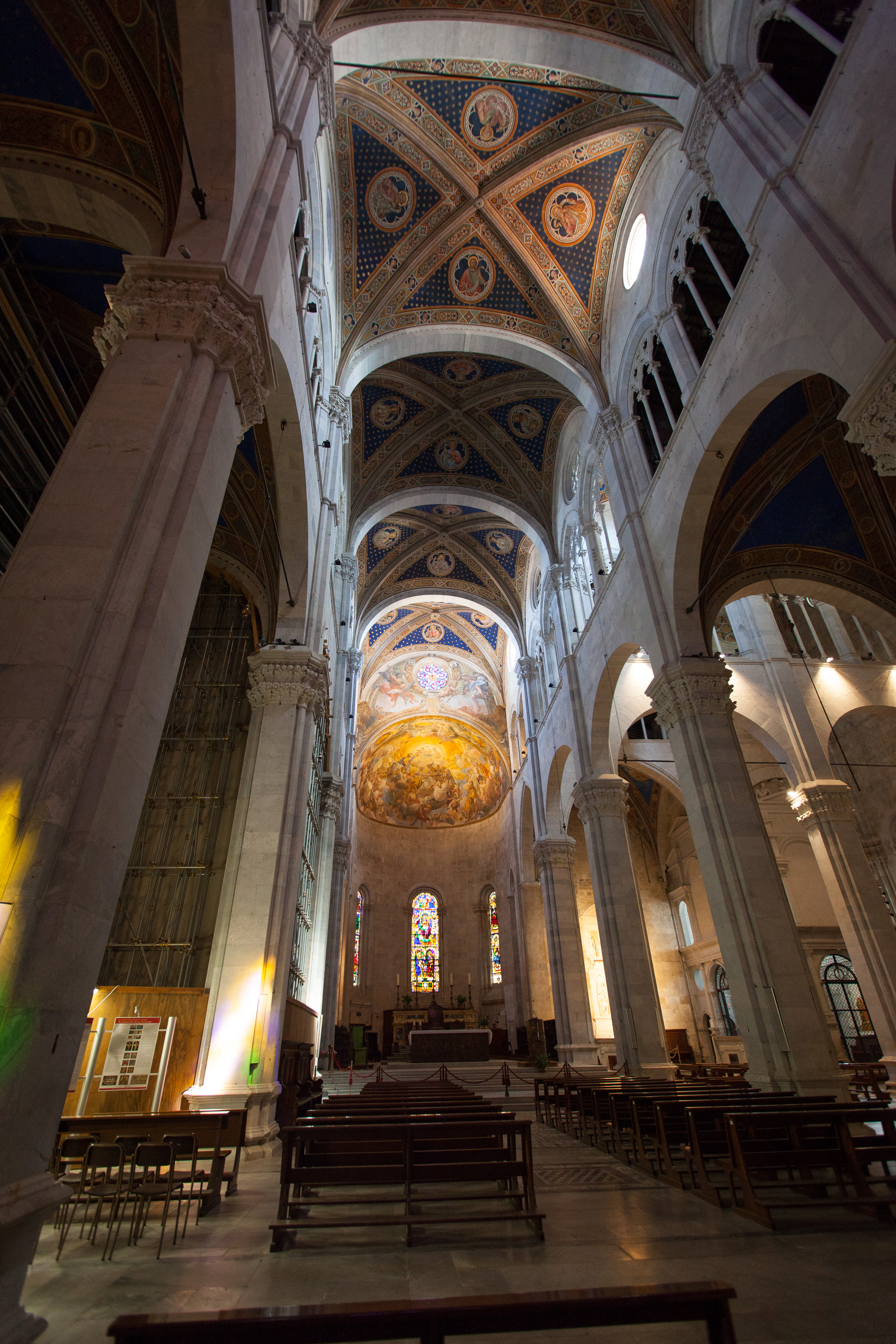 Lucca